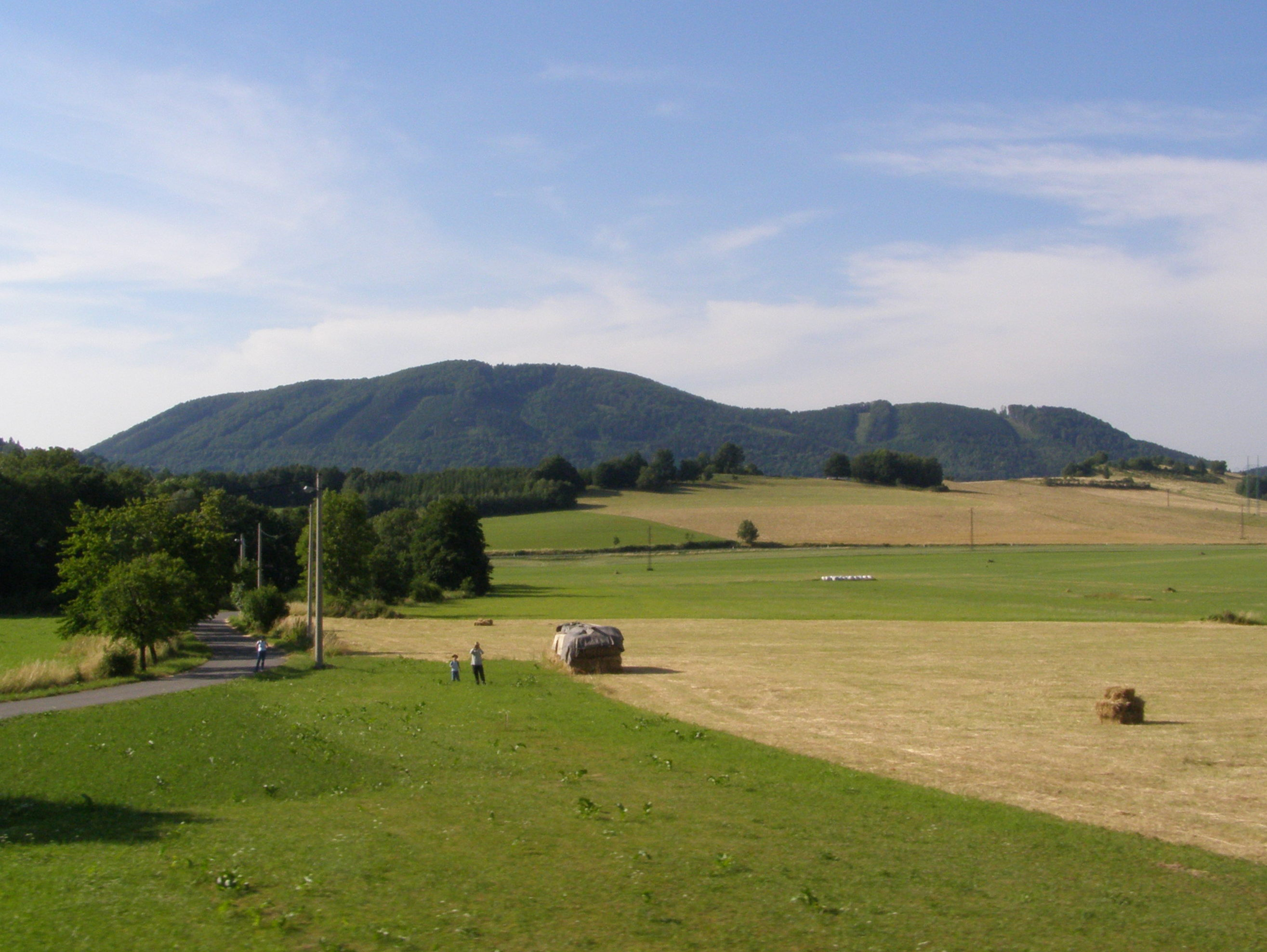 Radhošťské podhůří, v pozadí masiv Červený kámen (690 m)